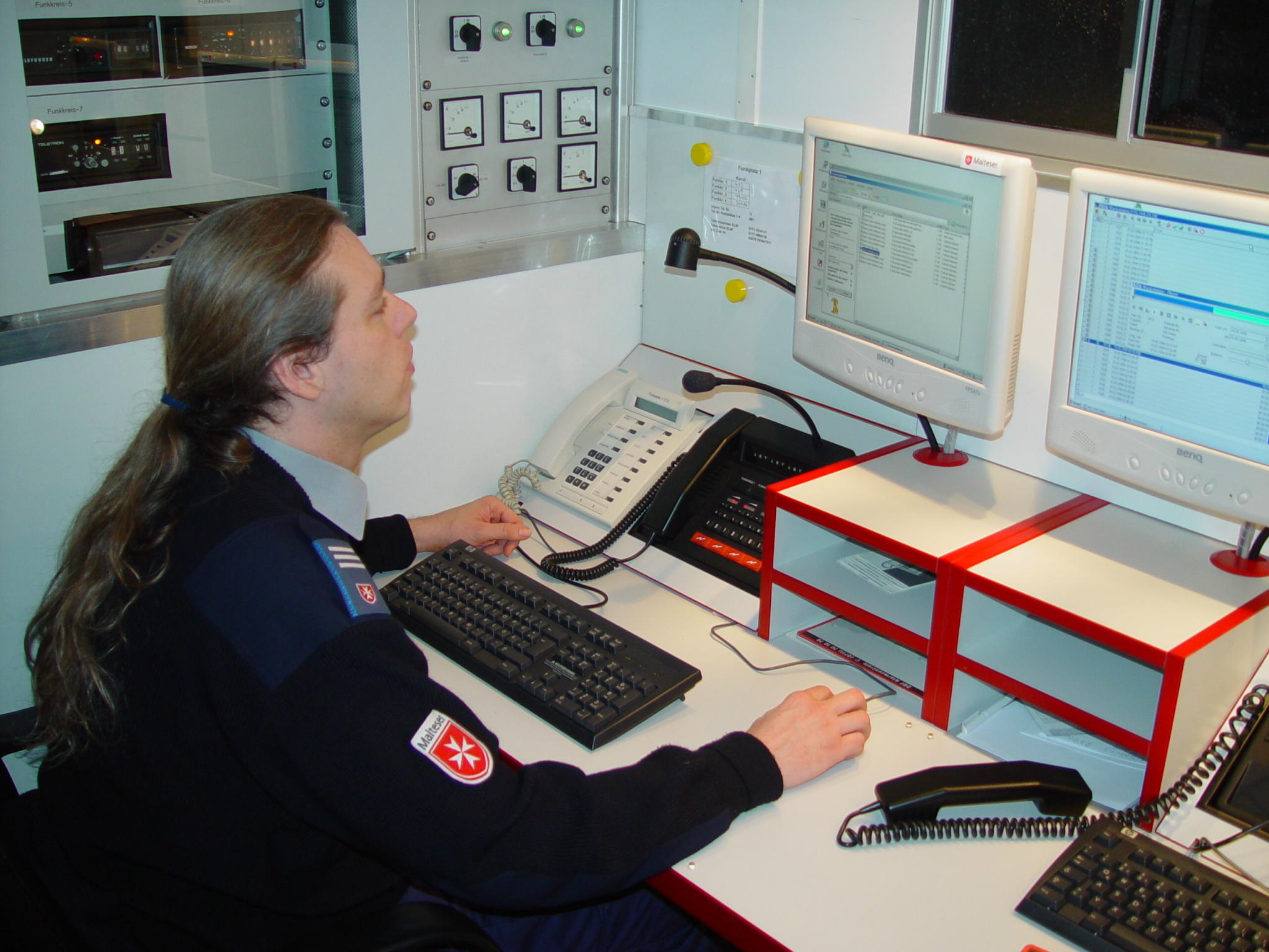 Kommunikationsarbeitsplatz im Einsatzleitwagen 2 des Fernmeldezuges des Malteser Hilfsdienstes aus Würzburg